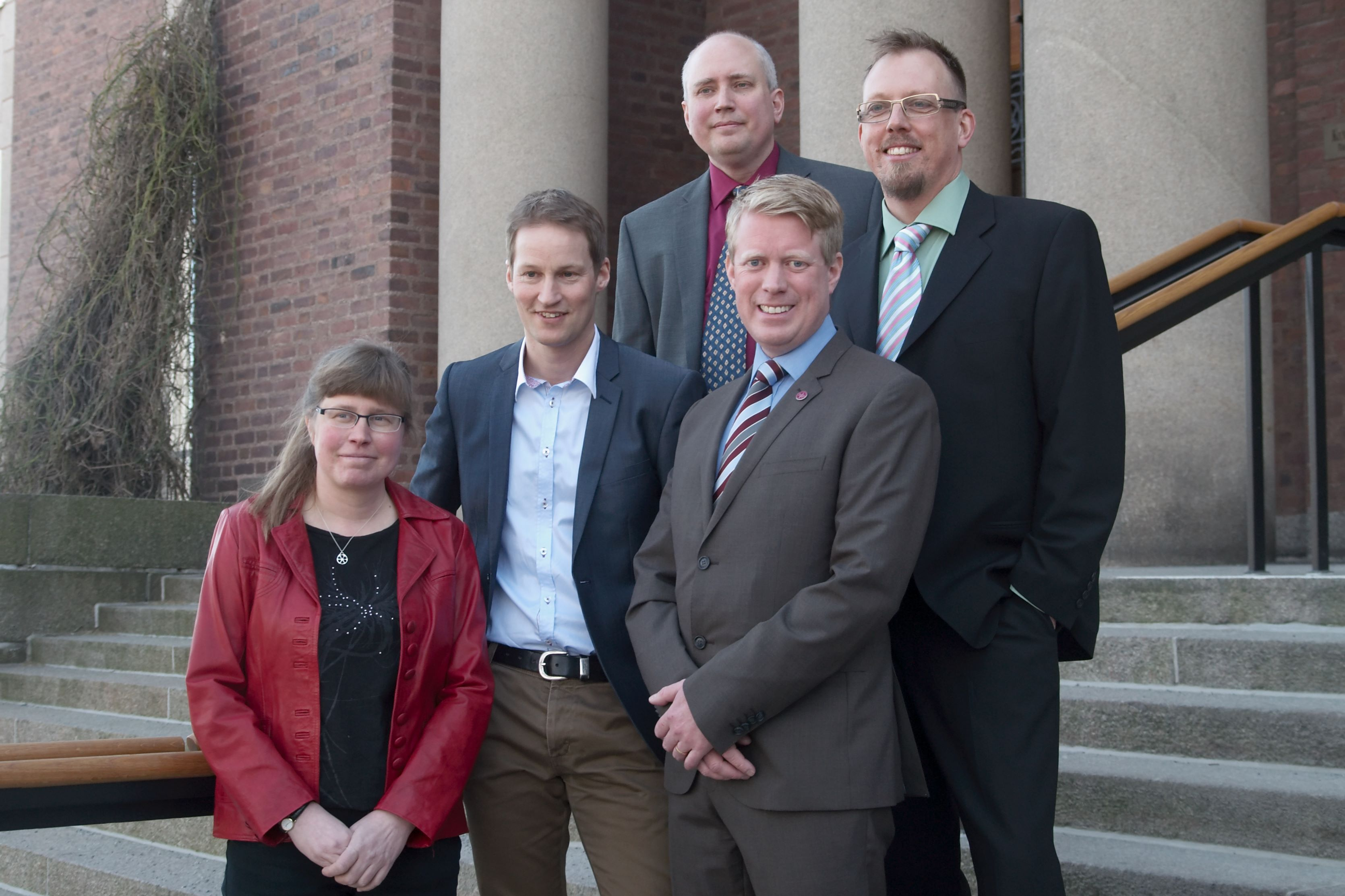 Göran Gustafssonprisen 2013: Johan Wästlund, docent i matematik, Chalmers tekniska högskola och Göteborgs universitet, Mats Fahlman, professor i ytors fysik och kemi, Linköpings universitet, Fredrik Almqvist, professor i organisk kemi, Umeå universitet, Kerstin Lindblad-Toh, professor i komparativ genomik, Uppsala universitet, Thomas Helleday, professor i translationell medicinsk forskning och kemisk biologi, Karolinska Institutet